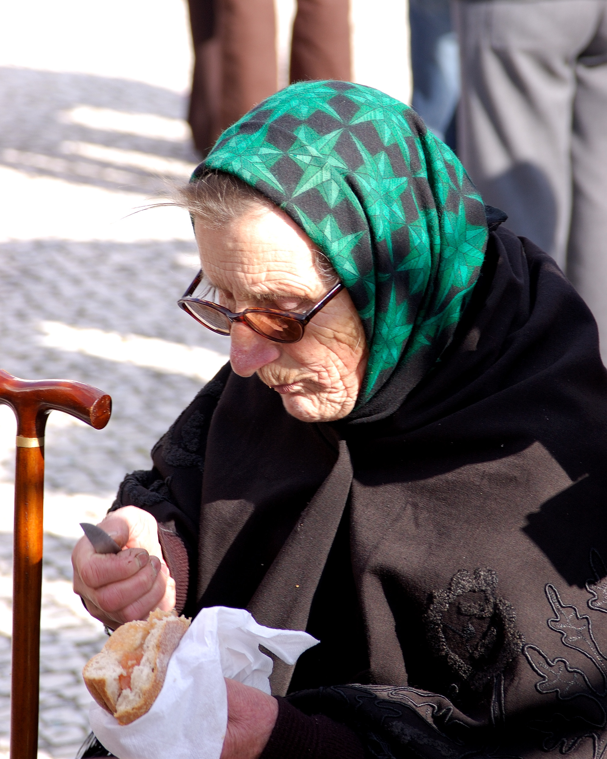 Bajouca, Portugal [2006]